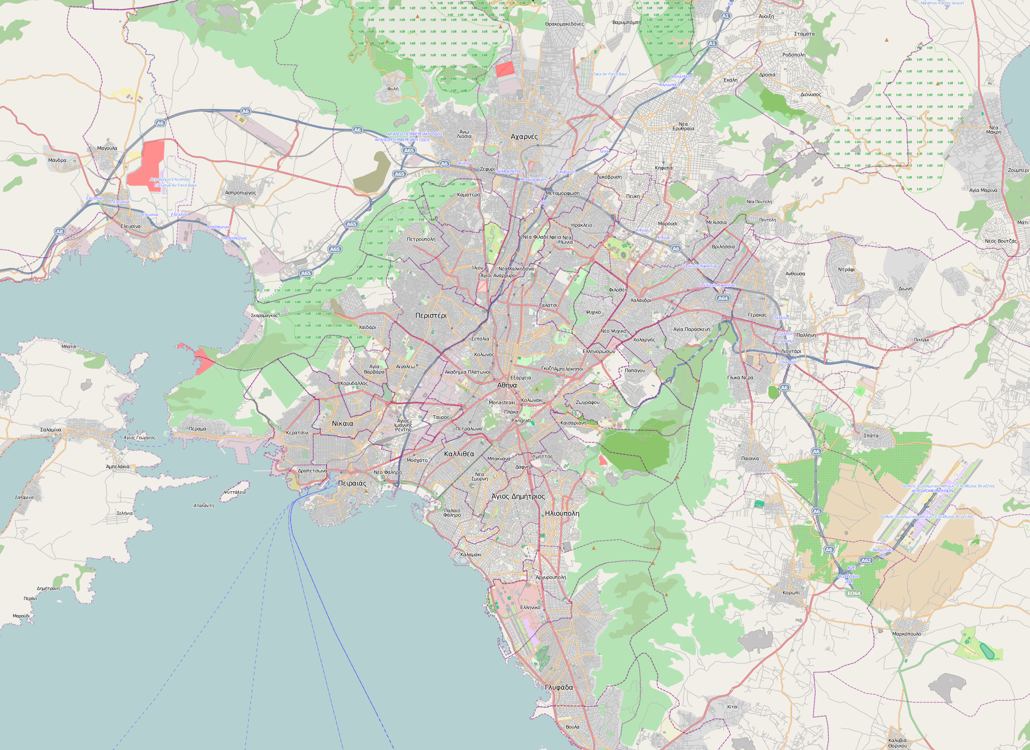 Map A6 (Attiki Odos)